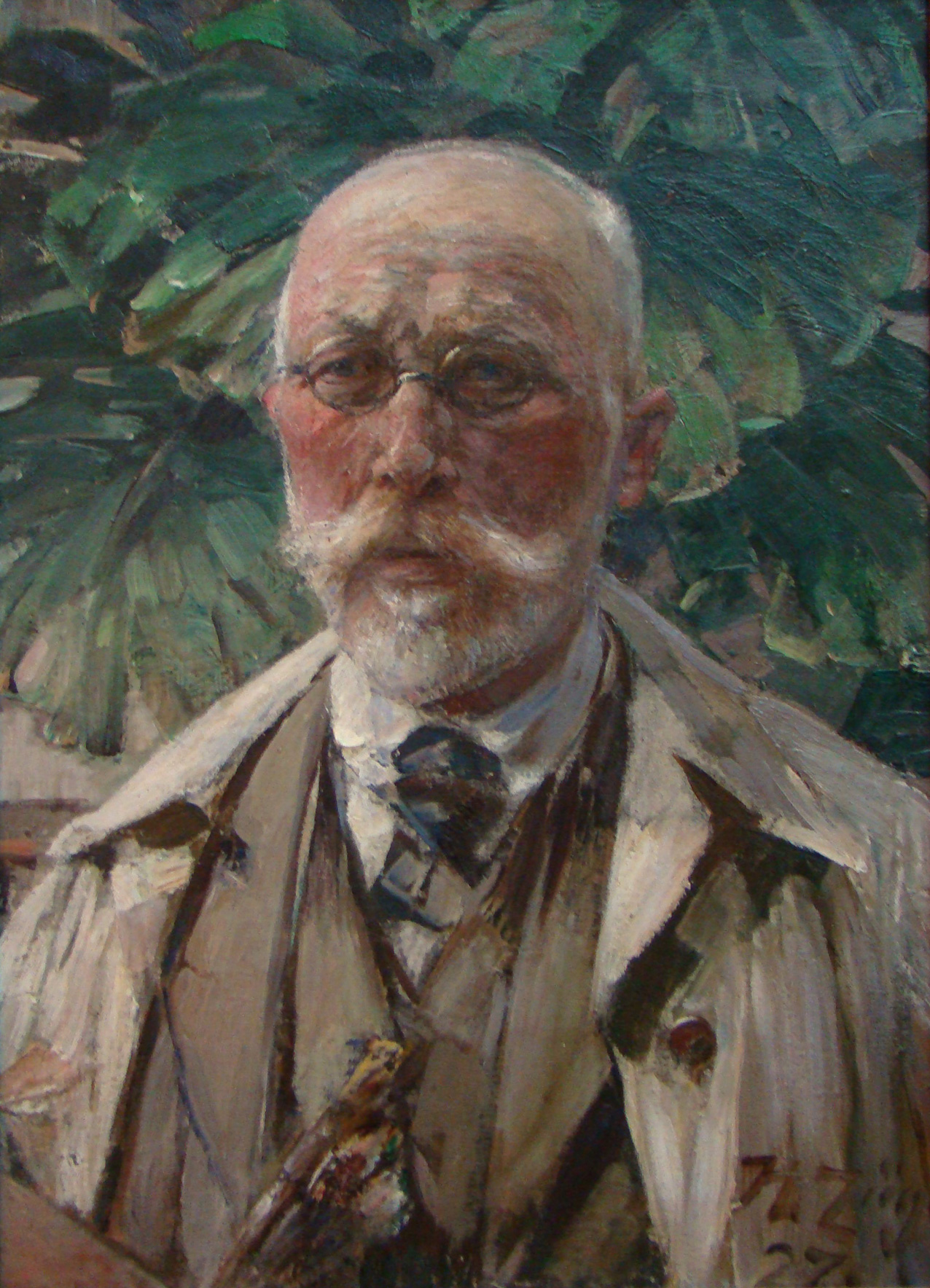 Selbstbildnis als Maler. Galerie der Stadt Murrhardt.